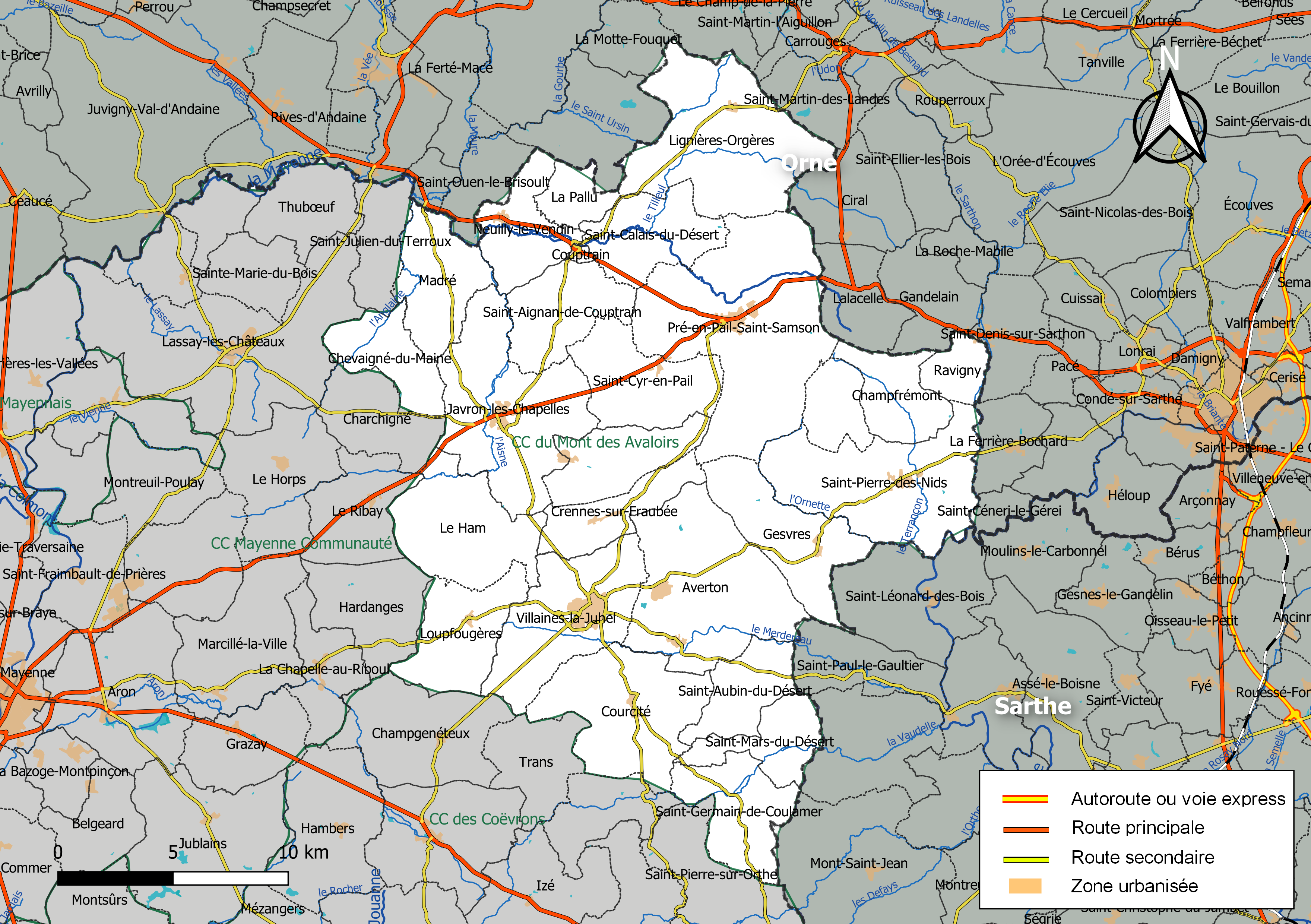 Carte géographique de la Communauté de communes du Mont des Avaloirs, département de la Mayenne, France. Composition au 1er janvier 2019.